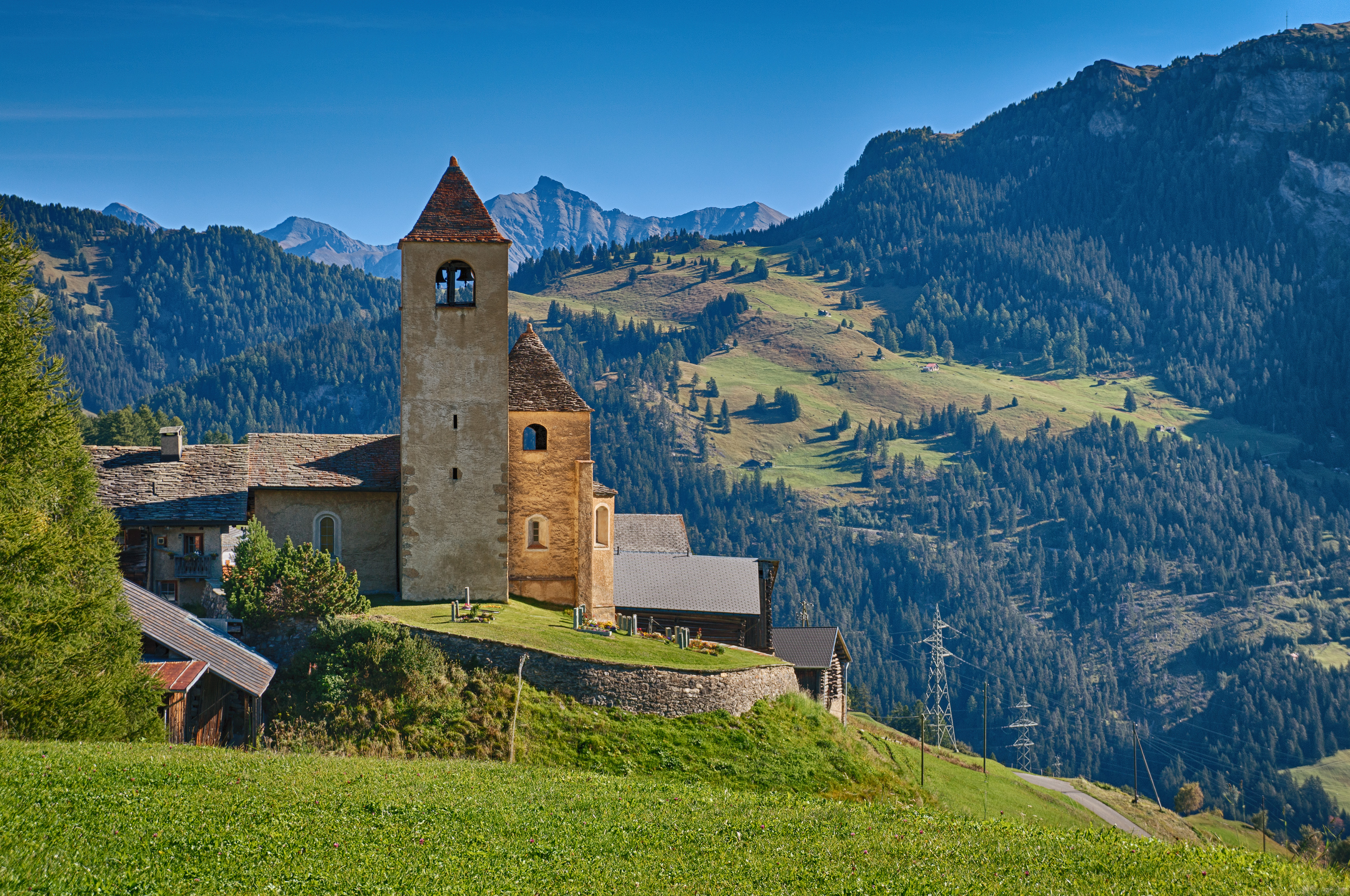 Rumantsch: Baselgia refurmada cun chasa pravenda